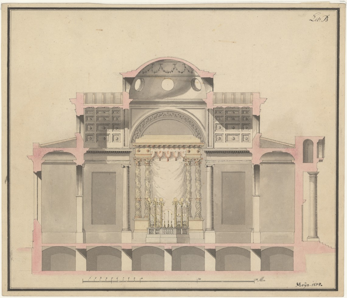 Peter Meyns forslag til en synagoge in København.